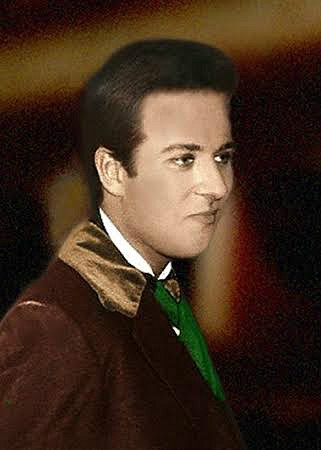 José Carlos Xavier na Opéra Don Pasquale a interpretar a personagem "Ernesto"